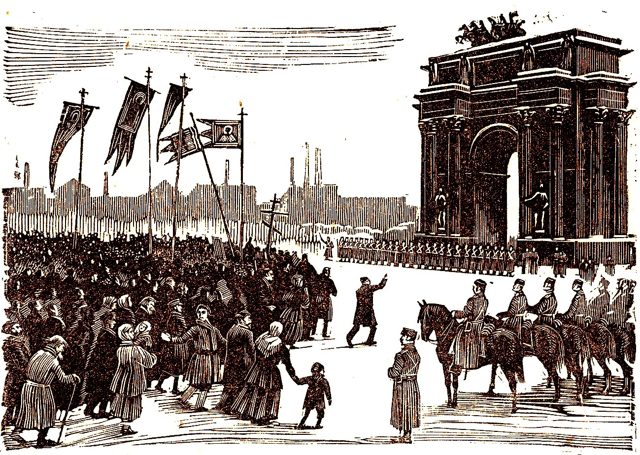 Утром 9-го января (у Нарвских ворот). Гравюра неизвестного художника.